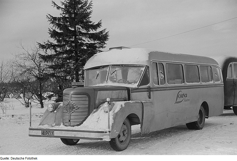 Original image description from the Deutsche Fotothek Vorder- und Seitenansicht eines Busses der LOWA Bautzen